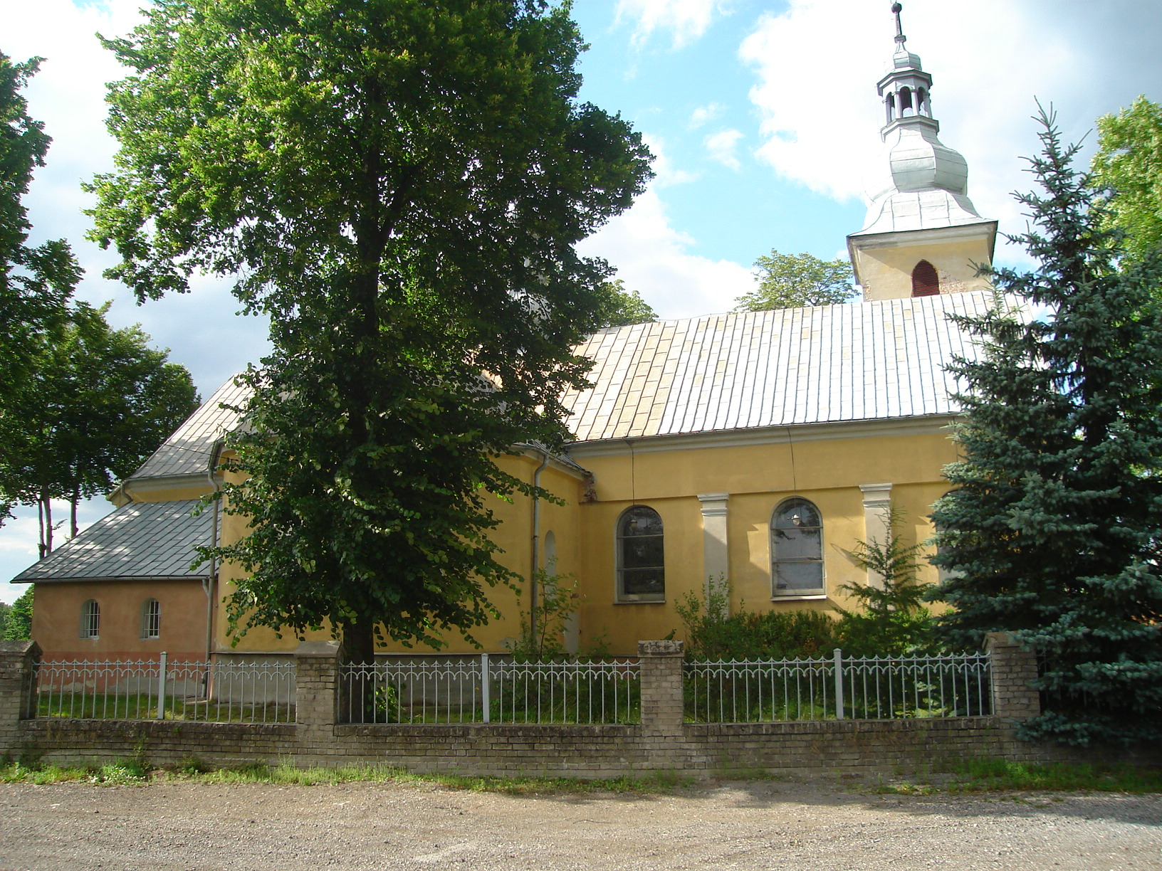 Kościół pw. św. Jakuba w Chlewicach